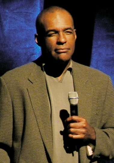 Michael Dorn auf der Galileo 7.9 Convention (2005 in Neuss, Deutschland)